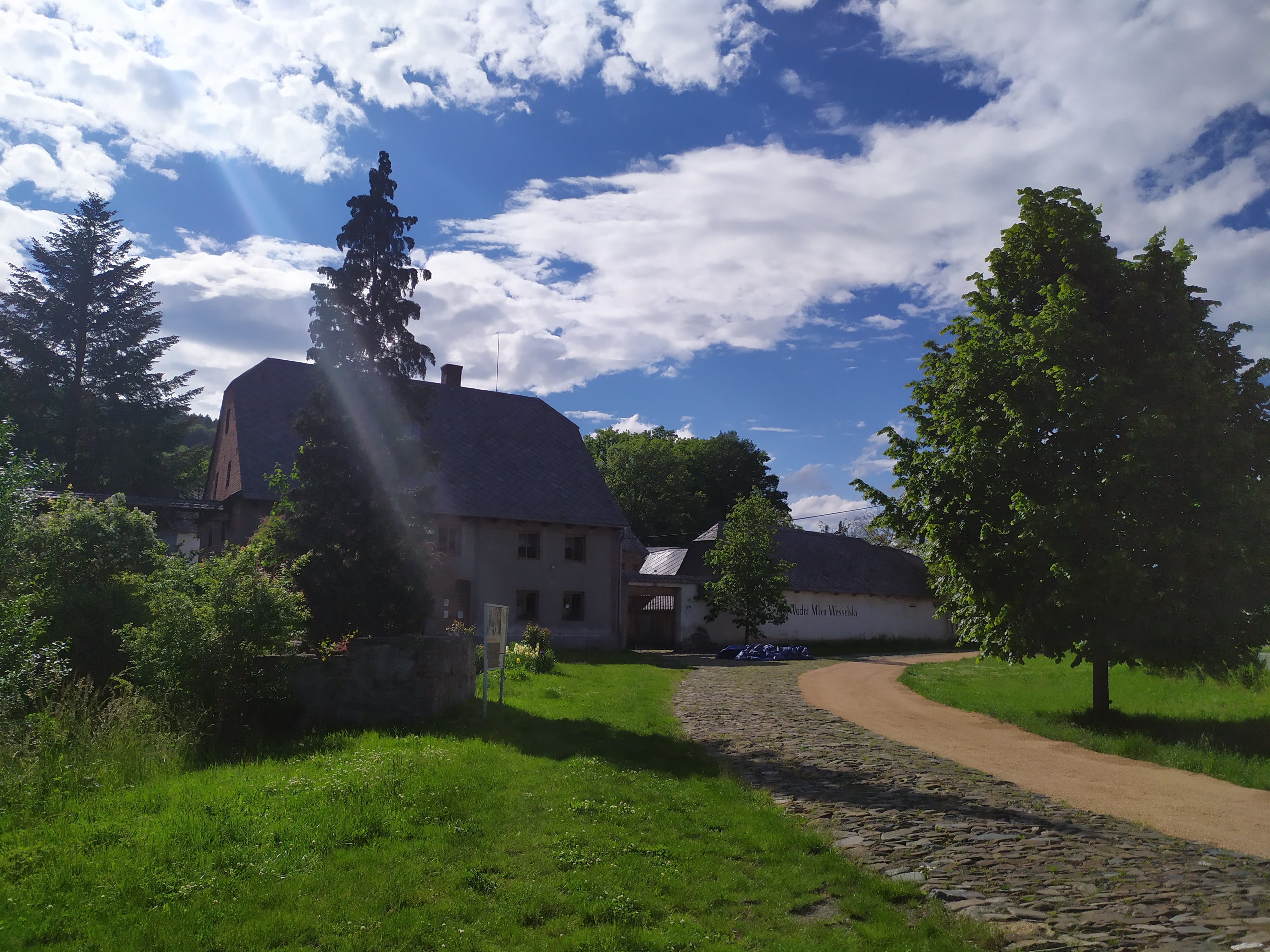 Vodní mlýn Wesselsky v Odrách-Loučkách